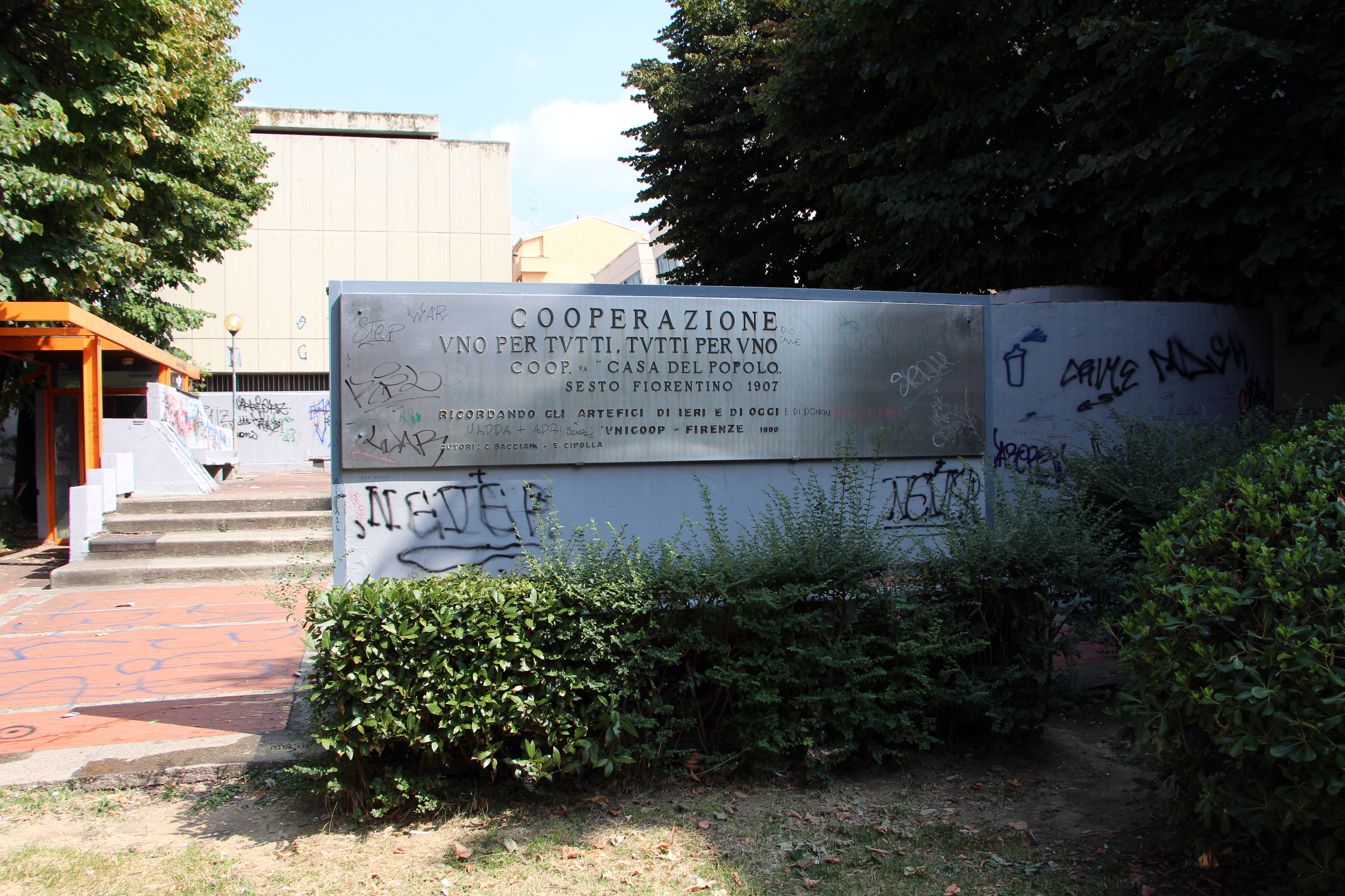 Sesto Fiorentino